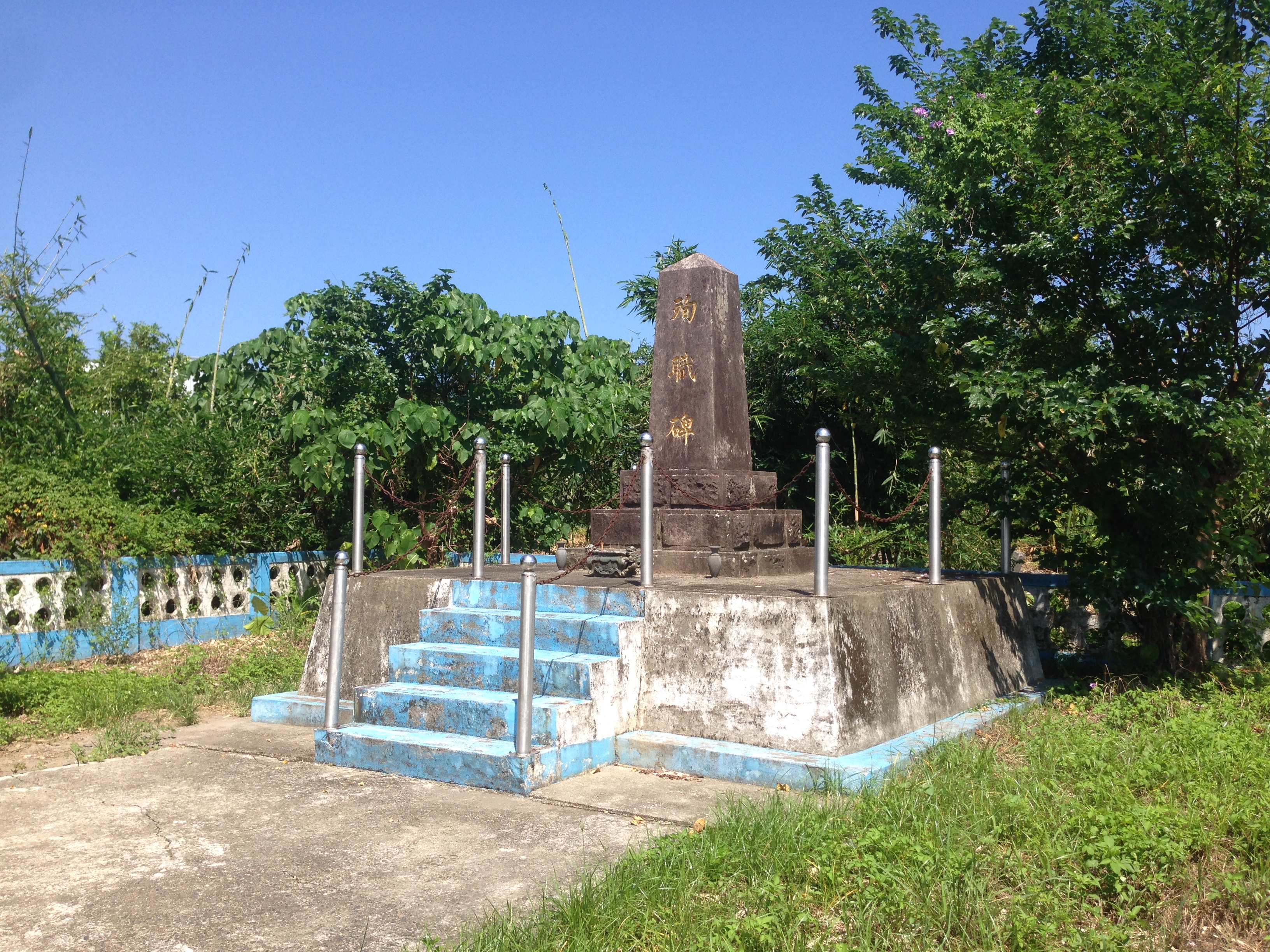 二結紙廠殉職碑斜照